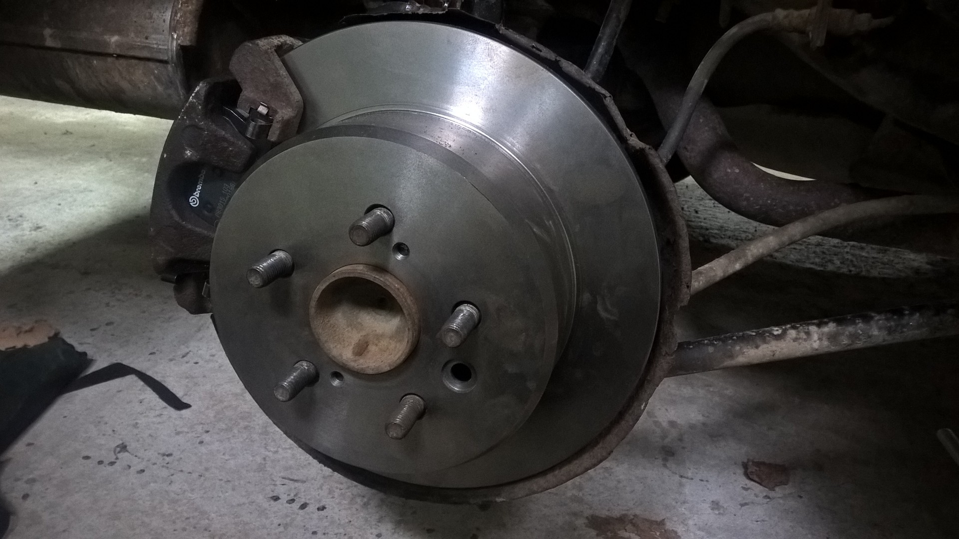 Тормозные диски и колодки Brembo